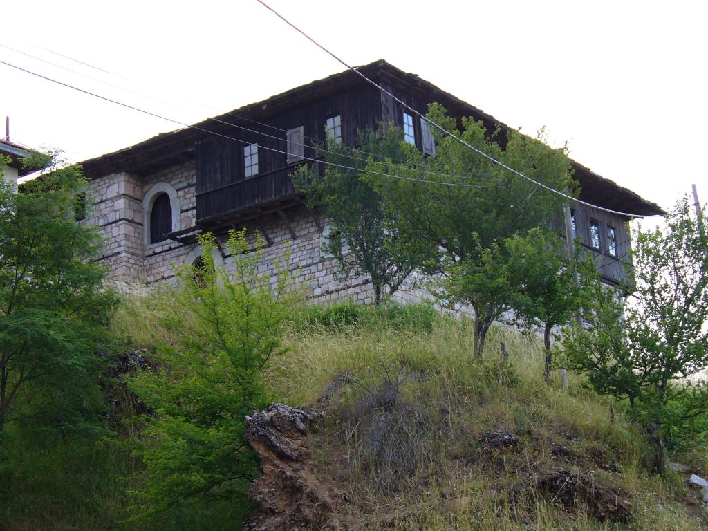 Galičnik, Macedonia